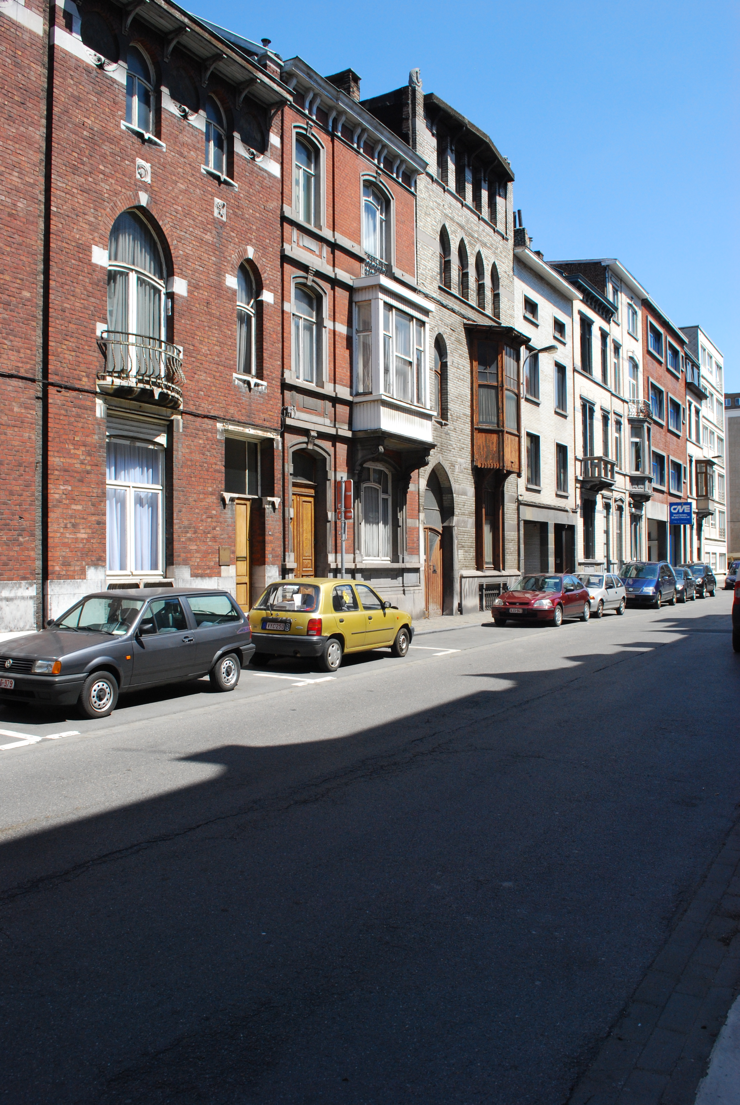 La rue du Vieux-Mayeur à Liège.